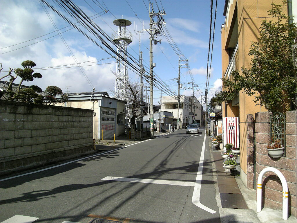 河内街道（大阪府八尾市萱振）